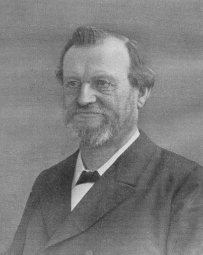 Karl Friedrich Wilhelm Müller (Wilhelm Müller), Altphilologe - Classical scholar